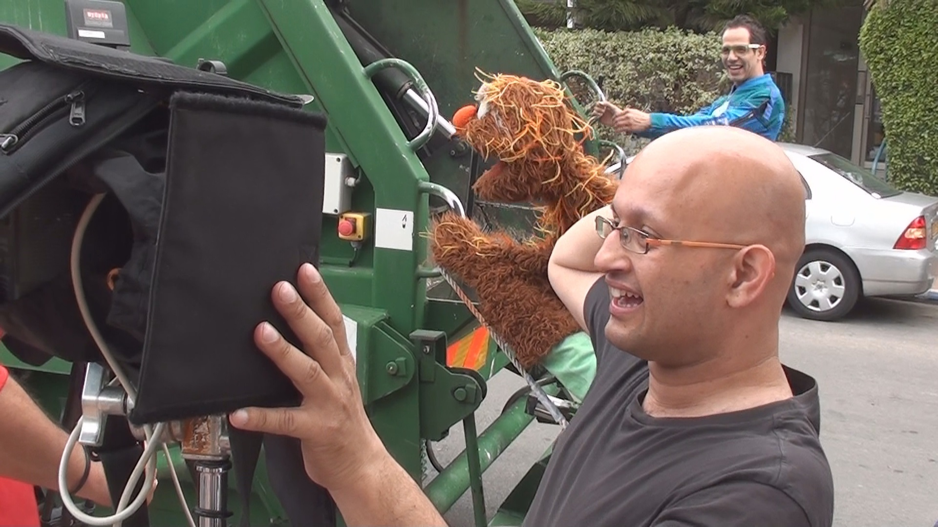 רחוב סומסום - אלון גור אריה